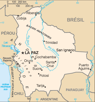 Carte de la Bolivie This map was improved or created by the Wikigraphists of the Graphic Lab (fr). You can propose images to clean up, improve, create or translate as well.